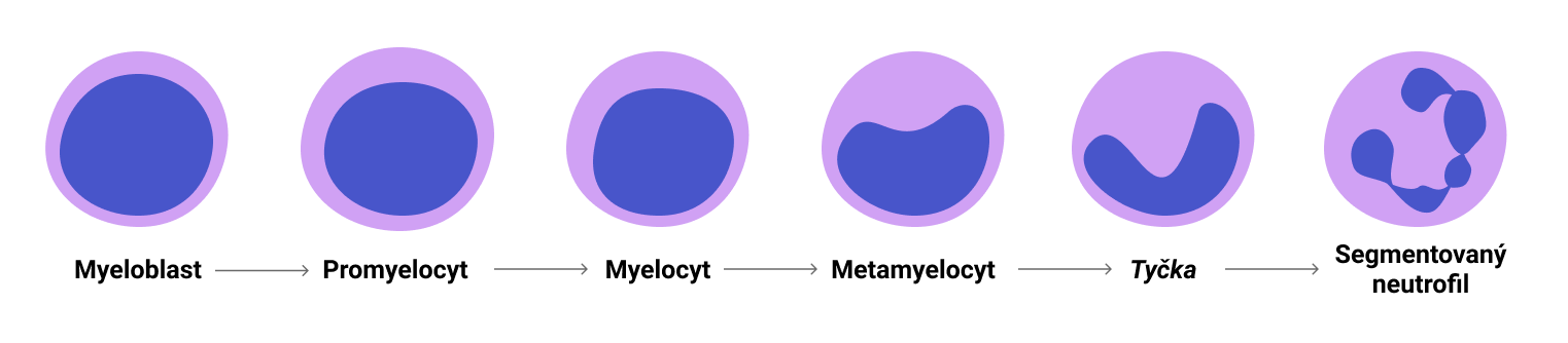 Během vývoje prochází neutrofily několika stádii, během nichž dochází k postupné kondenzaci a segmentaci jádra.